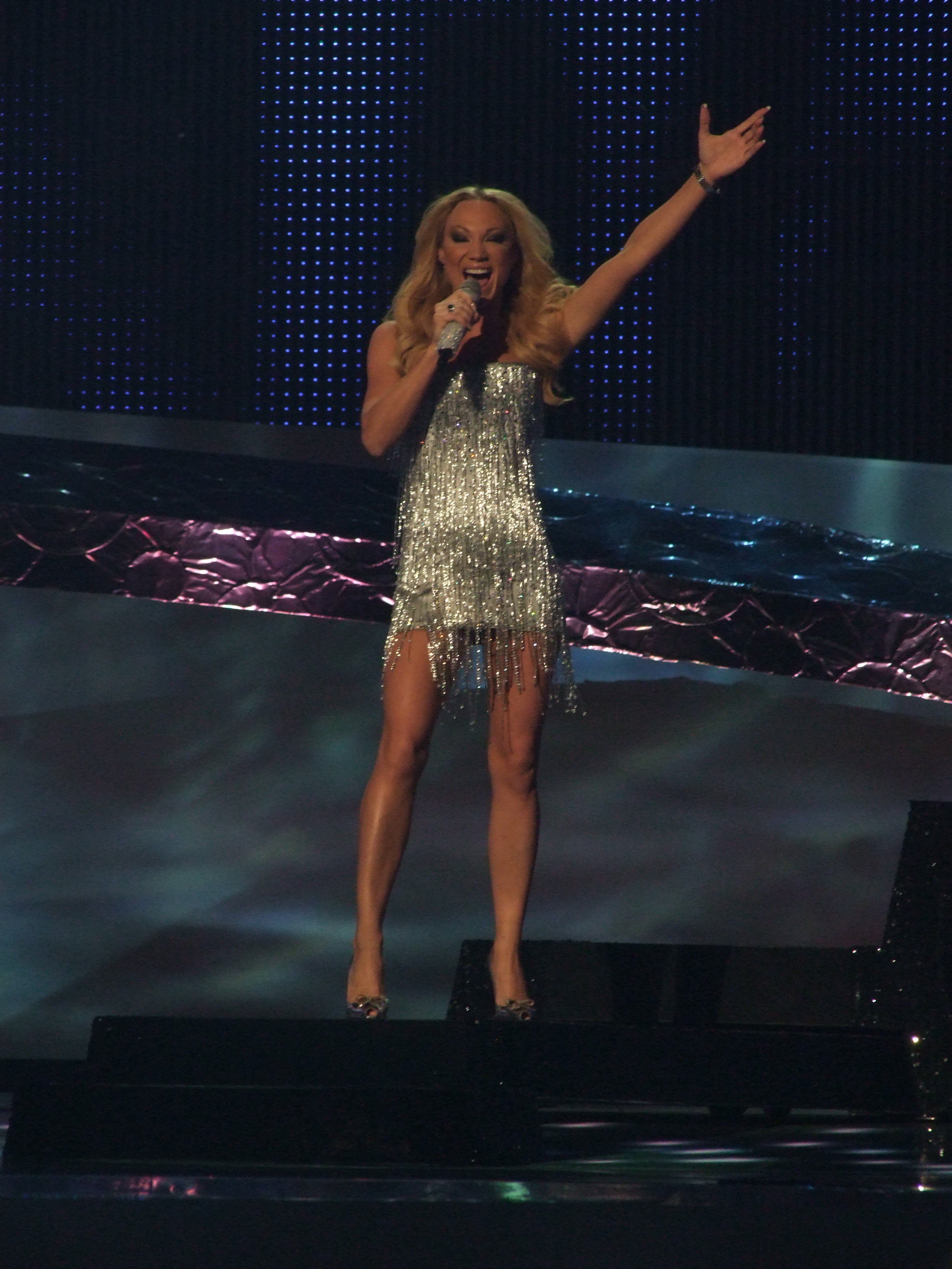 Final Eurovision 2008